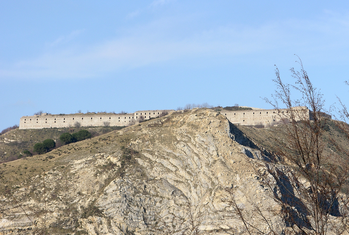 Genova, Forte Ratti